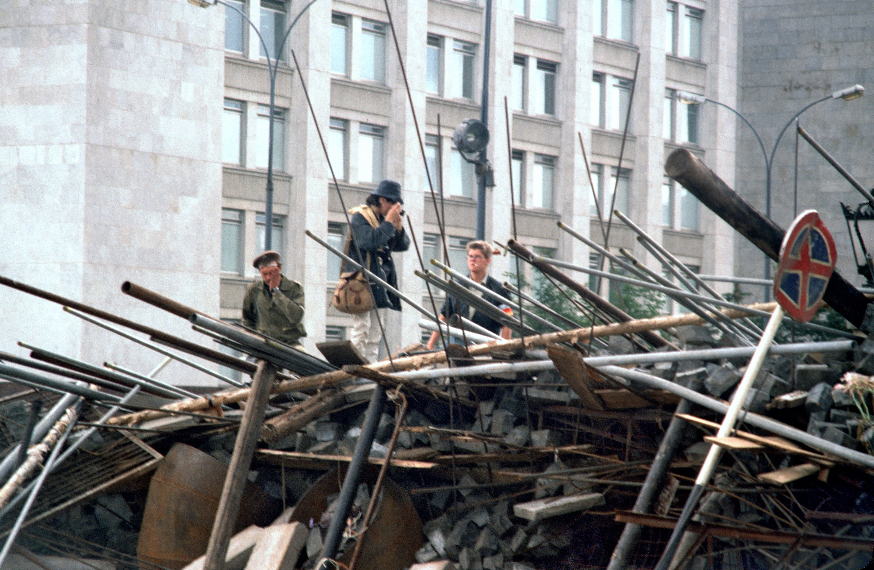 Баррикада на Горбатом мосту около Дома правительства РСФСР.